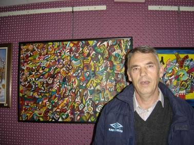 Arpad Eđed, kipar i slikar iz Bilja